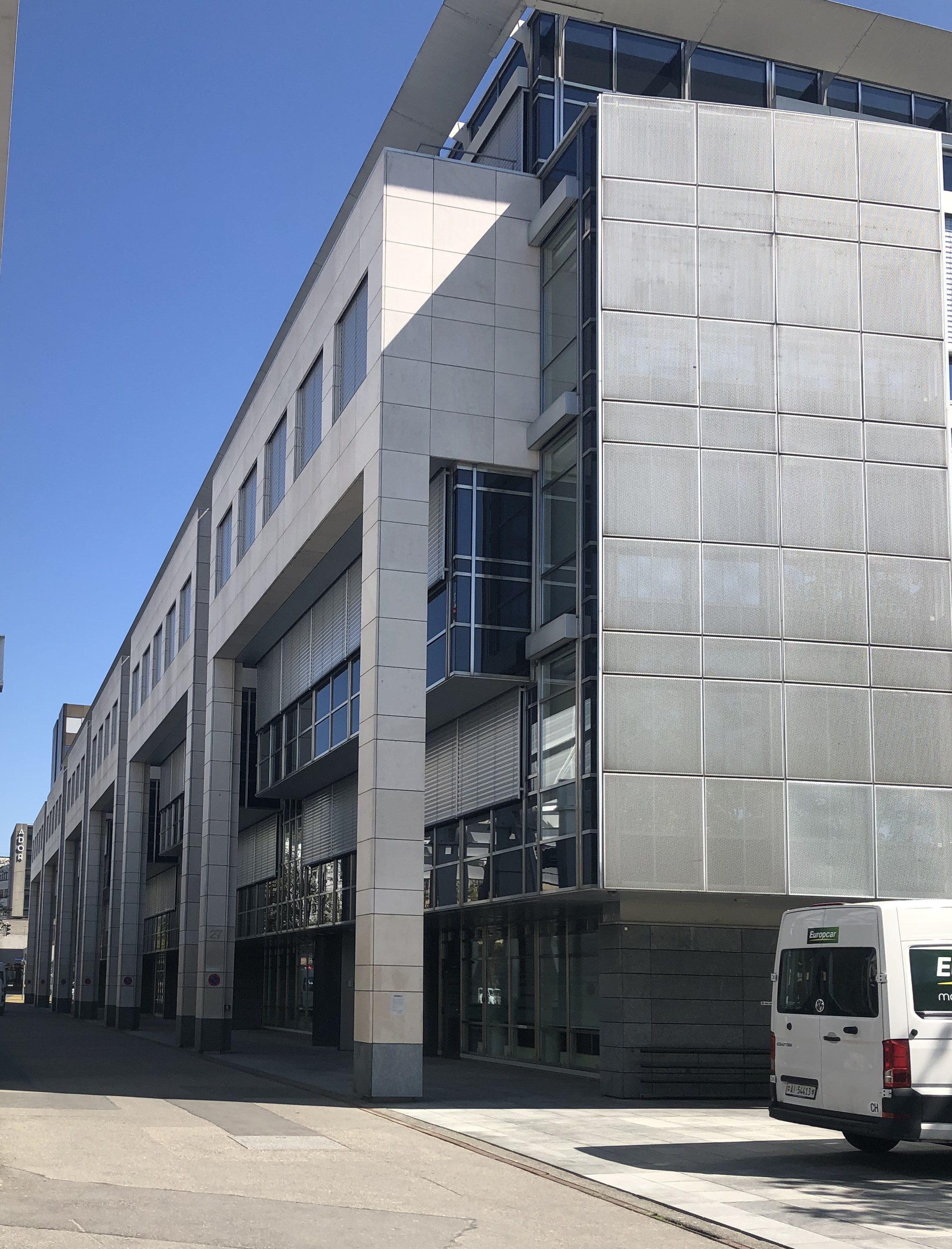 Gebäude FINMA